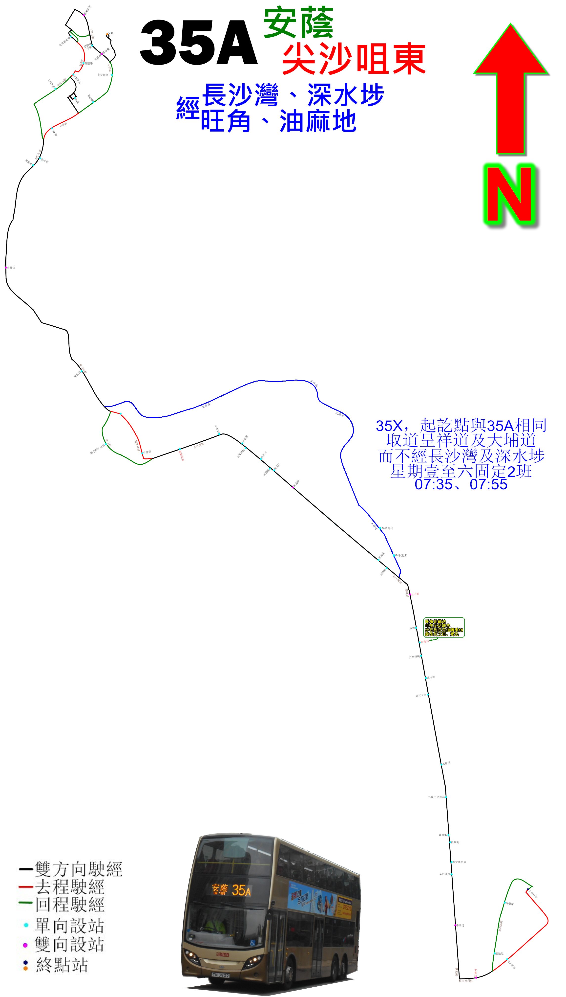 中文（香港）: 九巴35A線的走線圖